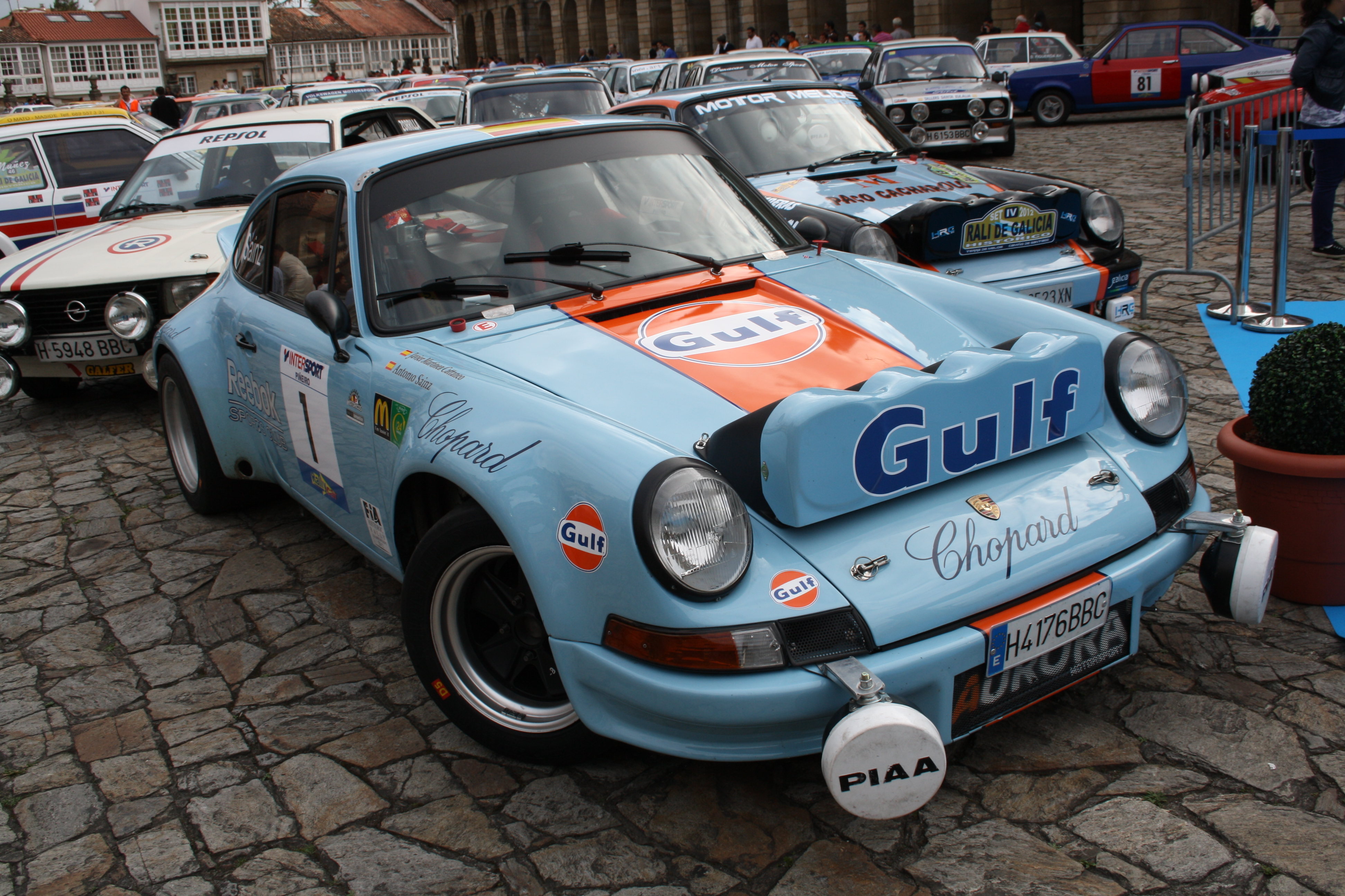 Rally de Galicia Histórico 2012